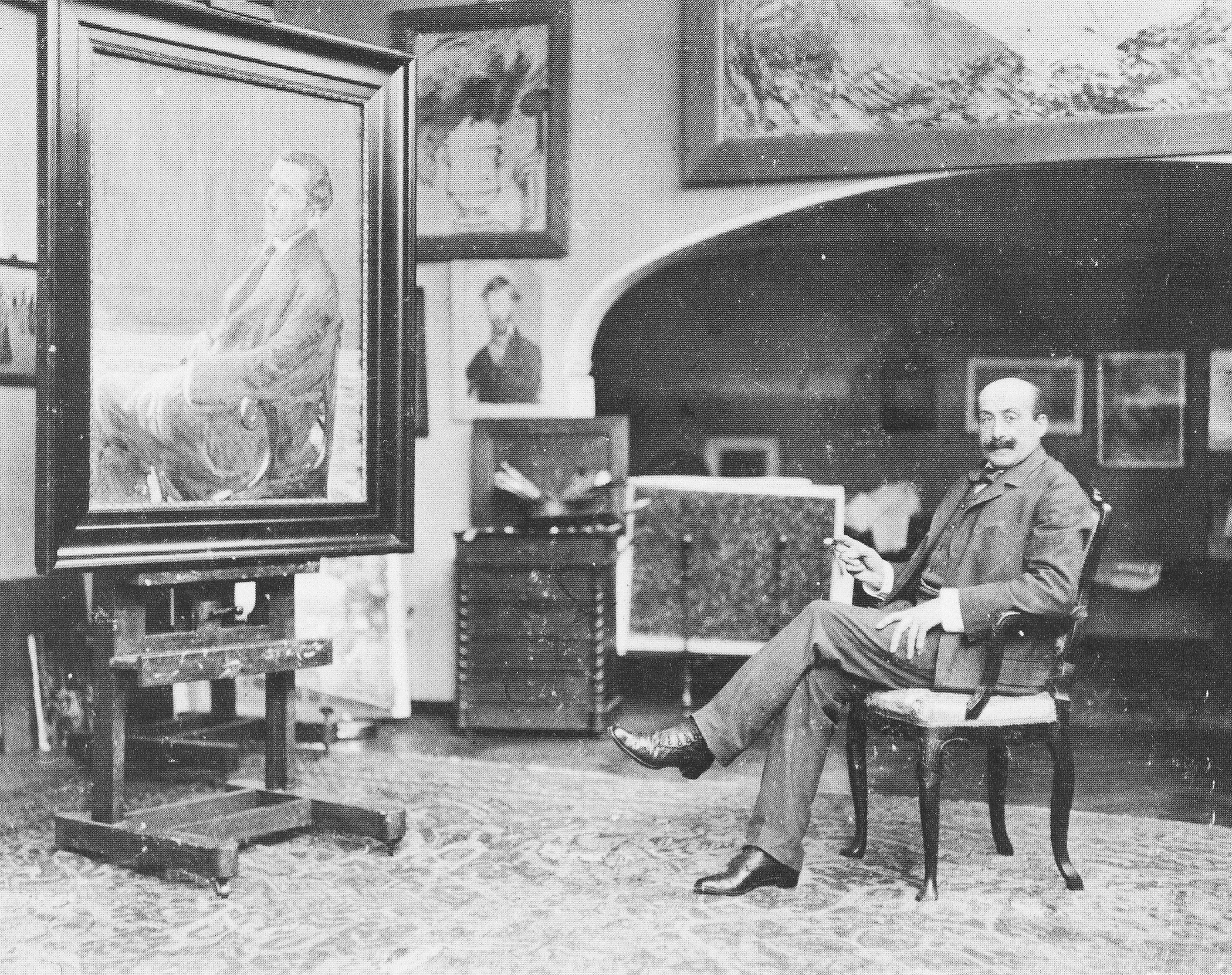 Max Liebermann in seinem Atelier am Pariser Platz.